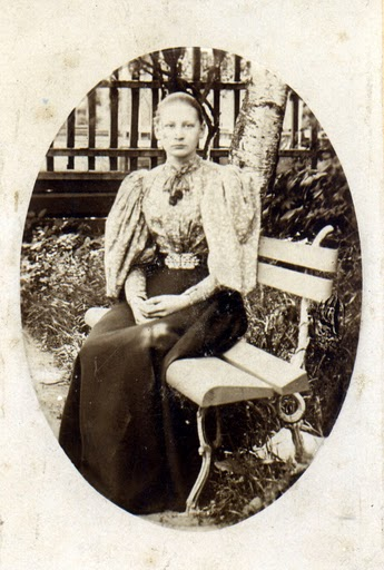 новомученица Екатерина Арская